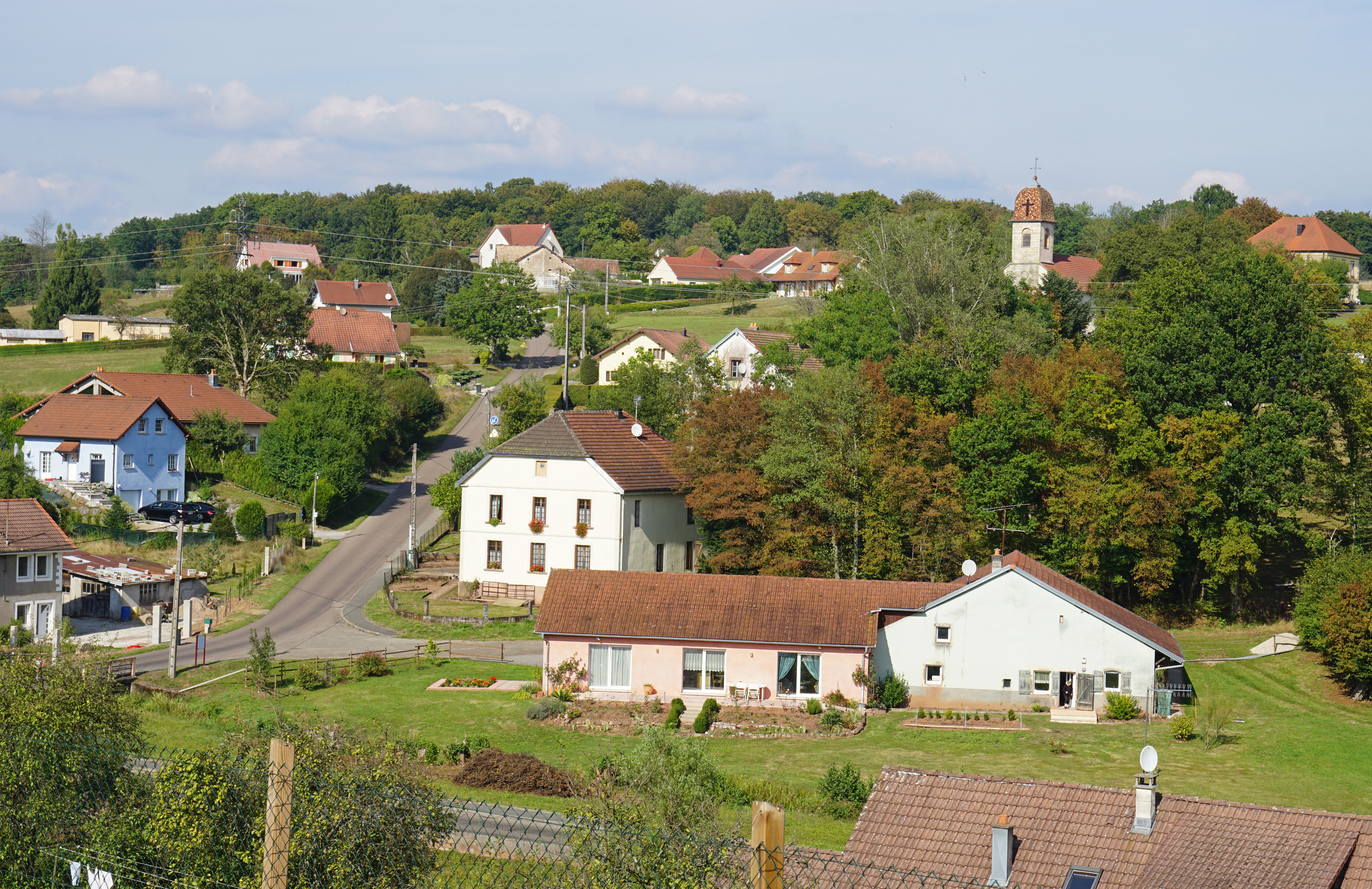 Chenebier.